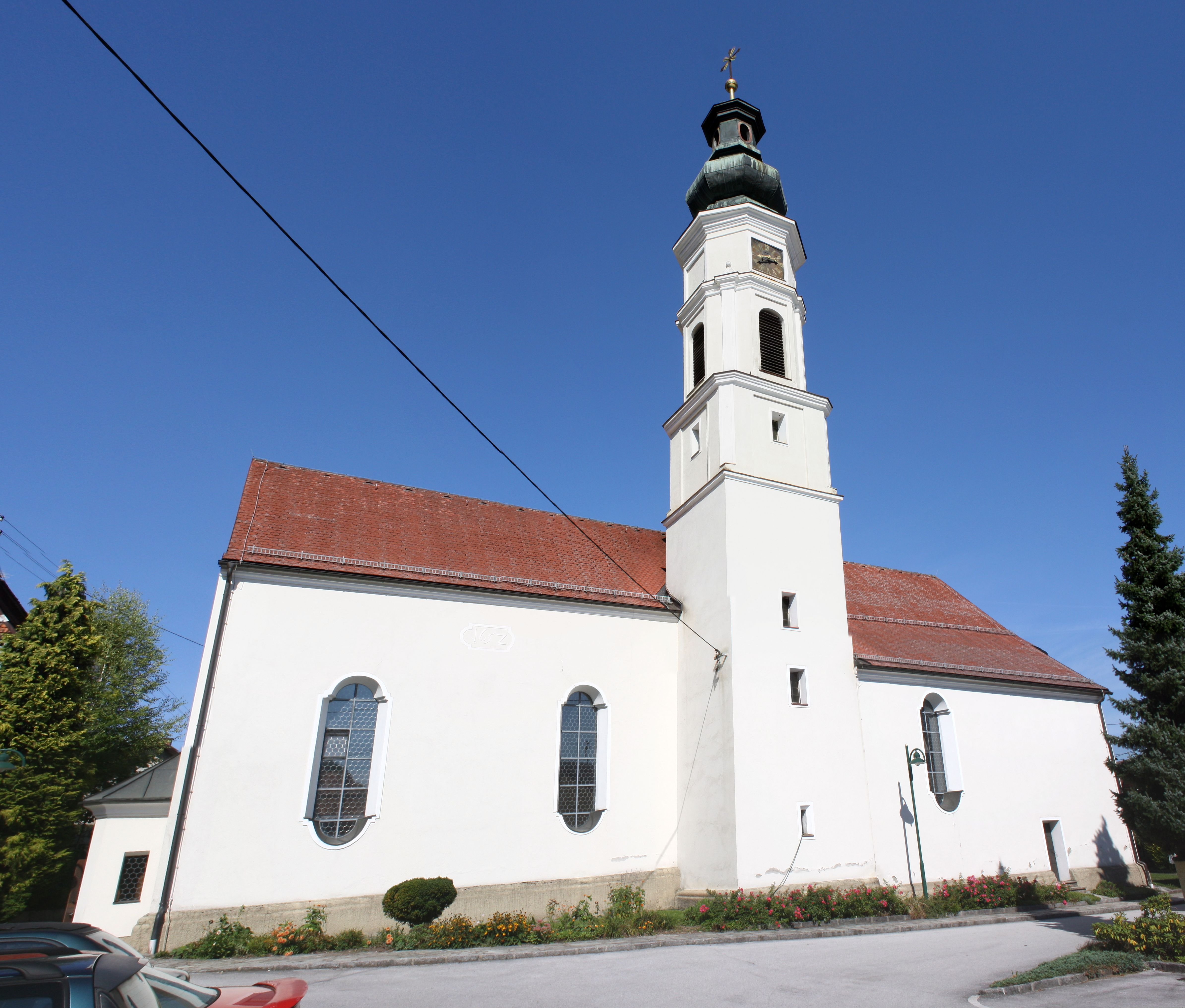 Kath. Pfarrkirche hll. Peter und Paul sowie ehem. Friedhof